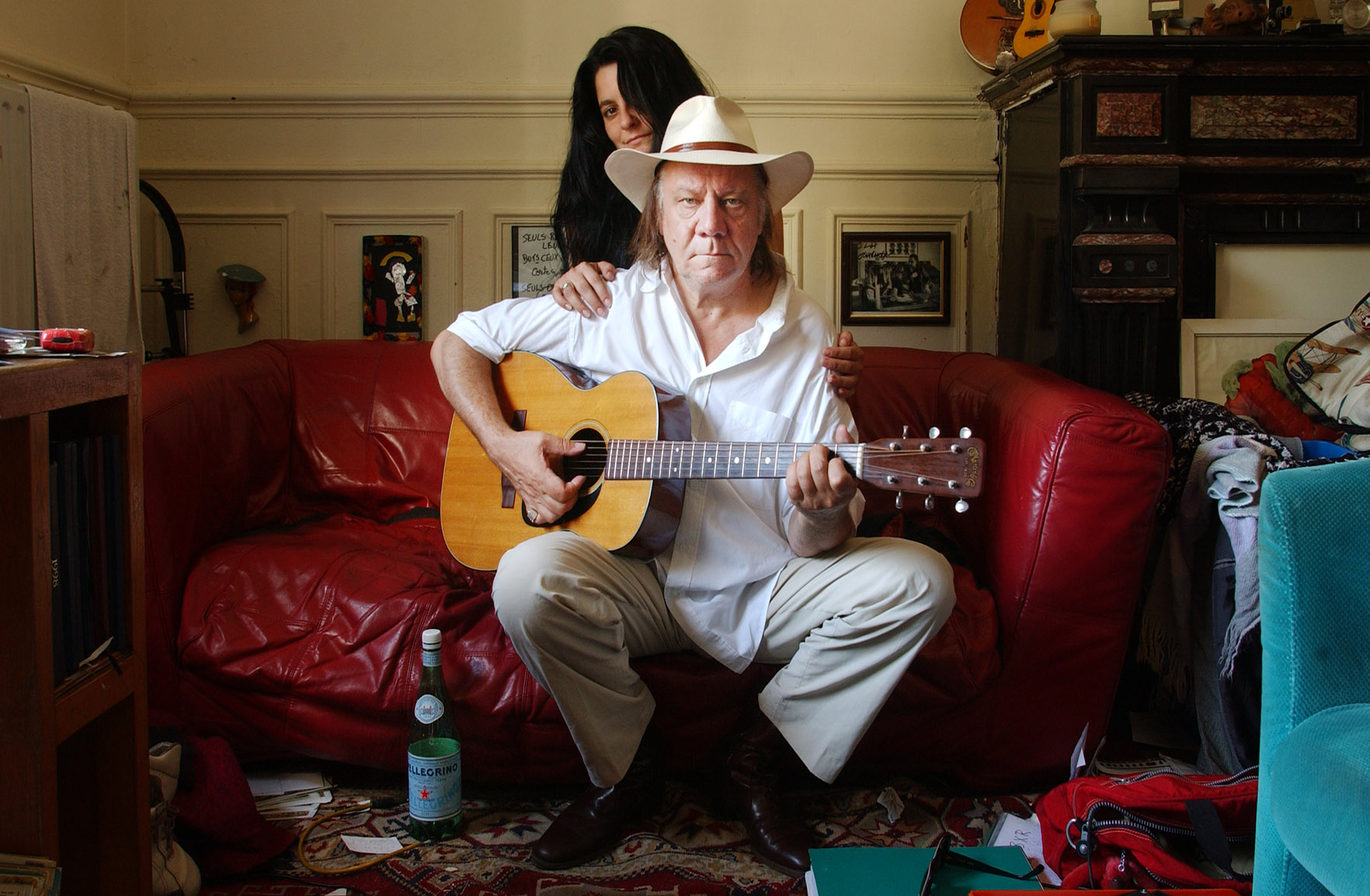 Roland Van Campenhout, Vlaamse bluesmuzikant.